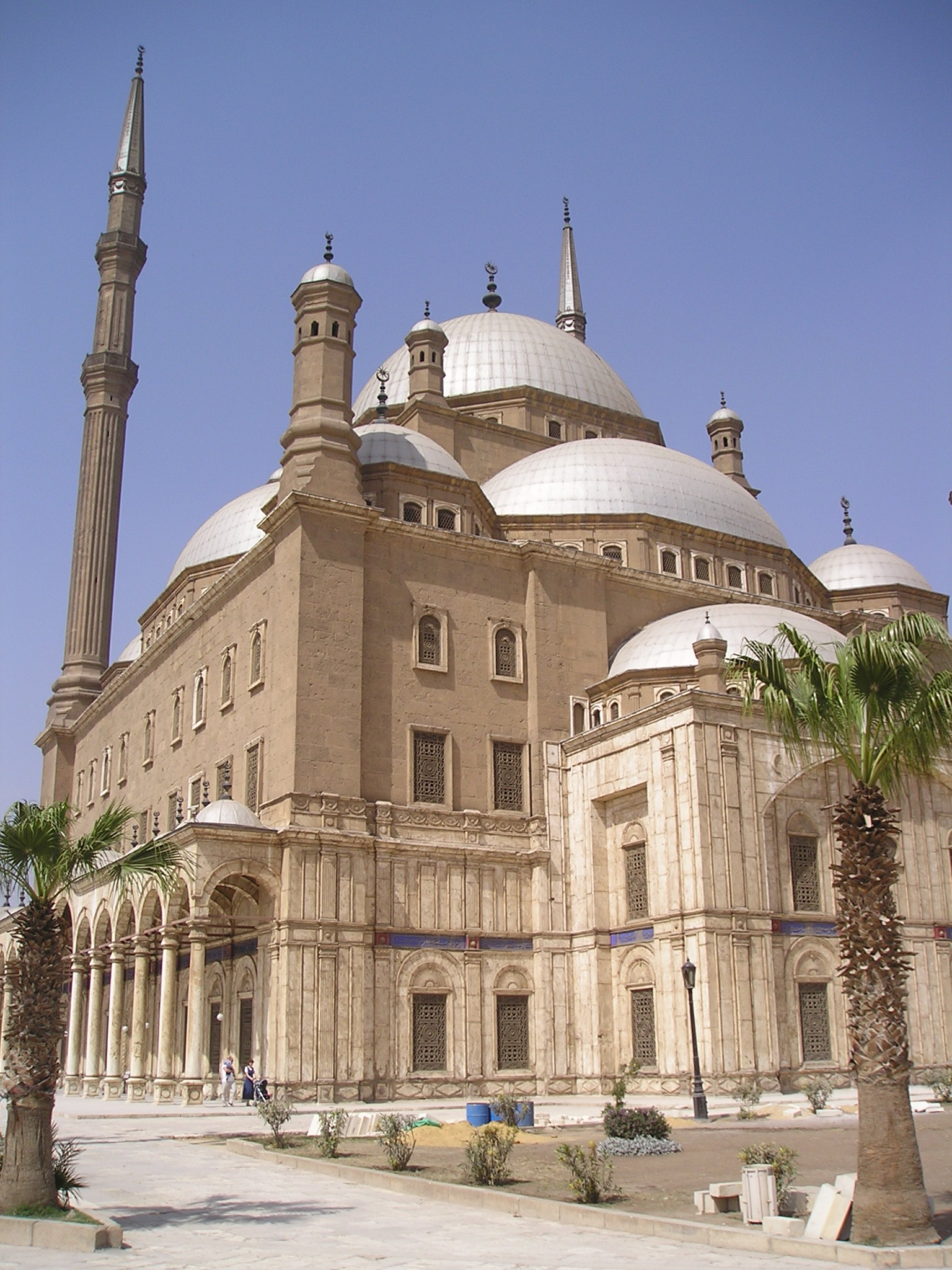 famous mosque in Cairo